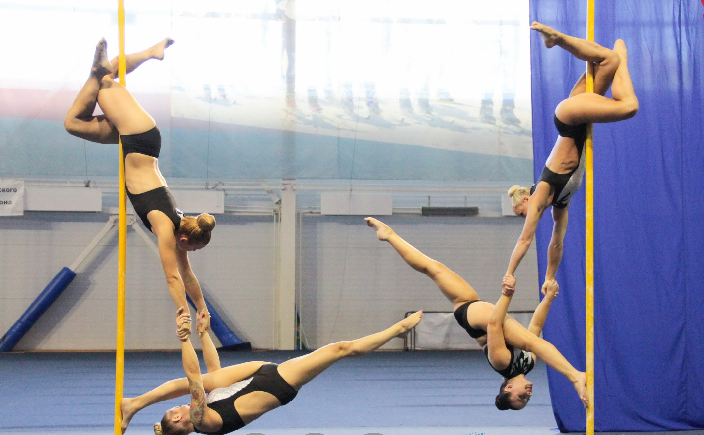 Выступление группа , дисциплина - спорт на пилоне